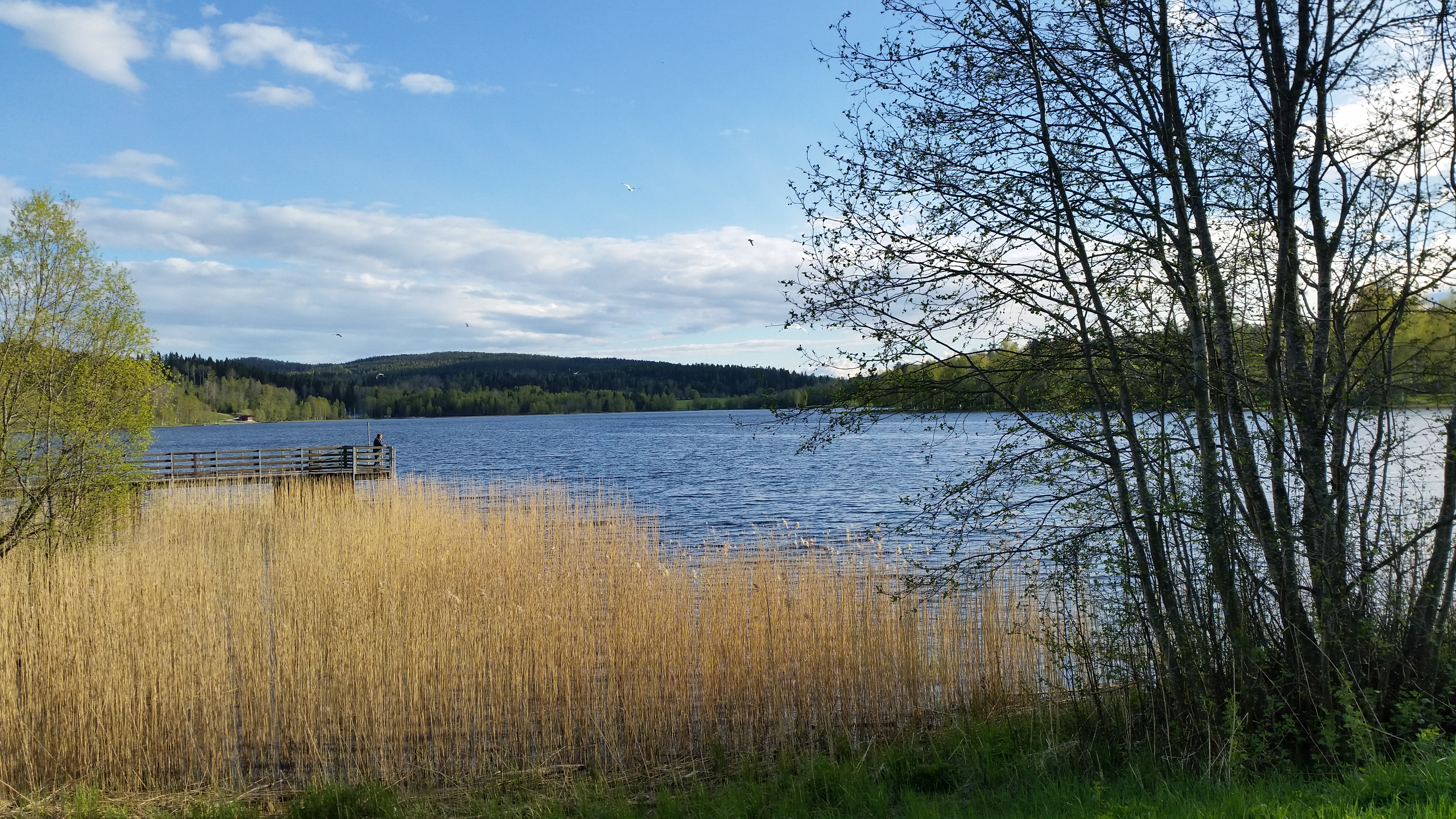 Sidsjön i maj